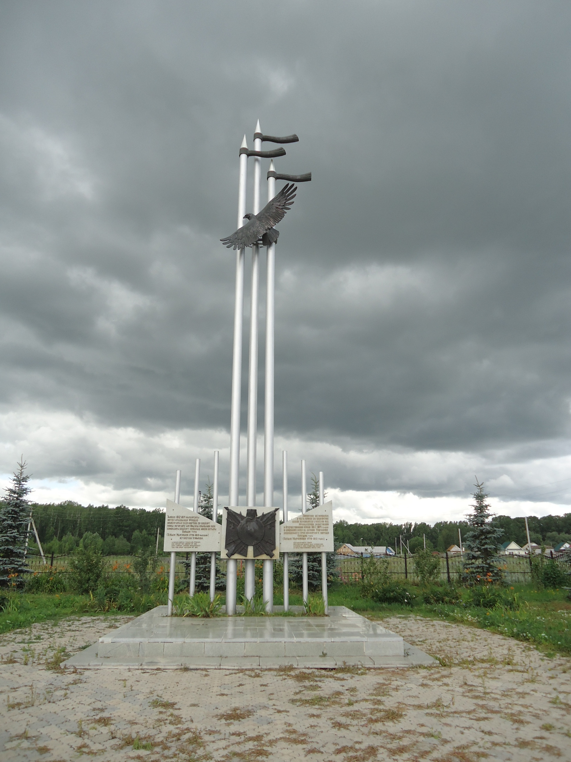 Башҡортса: Башҡорт халҡының милли батыры Ҡаһым-түрә Мырҙашев иҫтәлегенә стела. Стәрлетамаҡ районы, Айыусы ауылы. 2006 йыл.